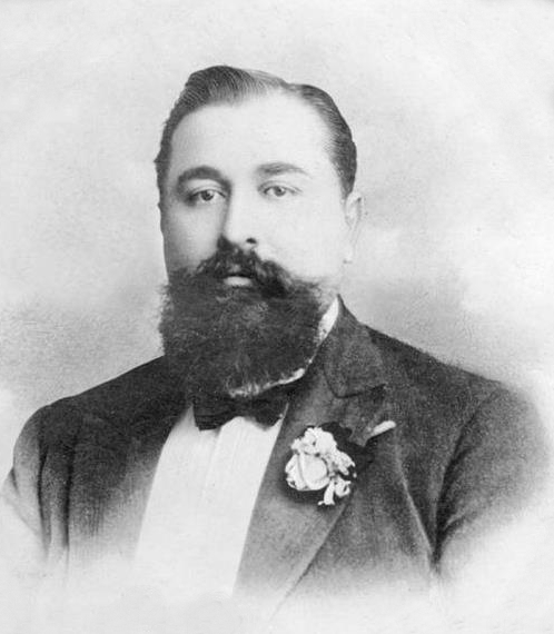 Fotografía de Leónidas Plaza Gutiérrez, presidente de Ecuador en dos ocasiones (1901-1905 y 1912-1916). Recorte de un retrato autografiado por el mismo el 15 de julio de 1915.